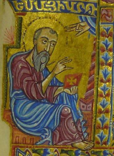 Есаи Нчеци, миниатюра 1318 года, Матенадаран